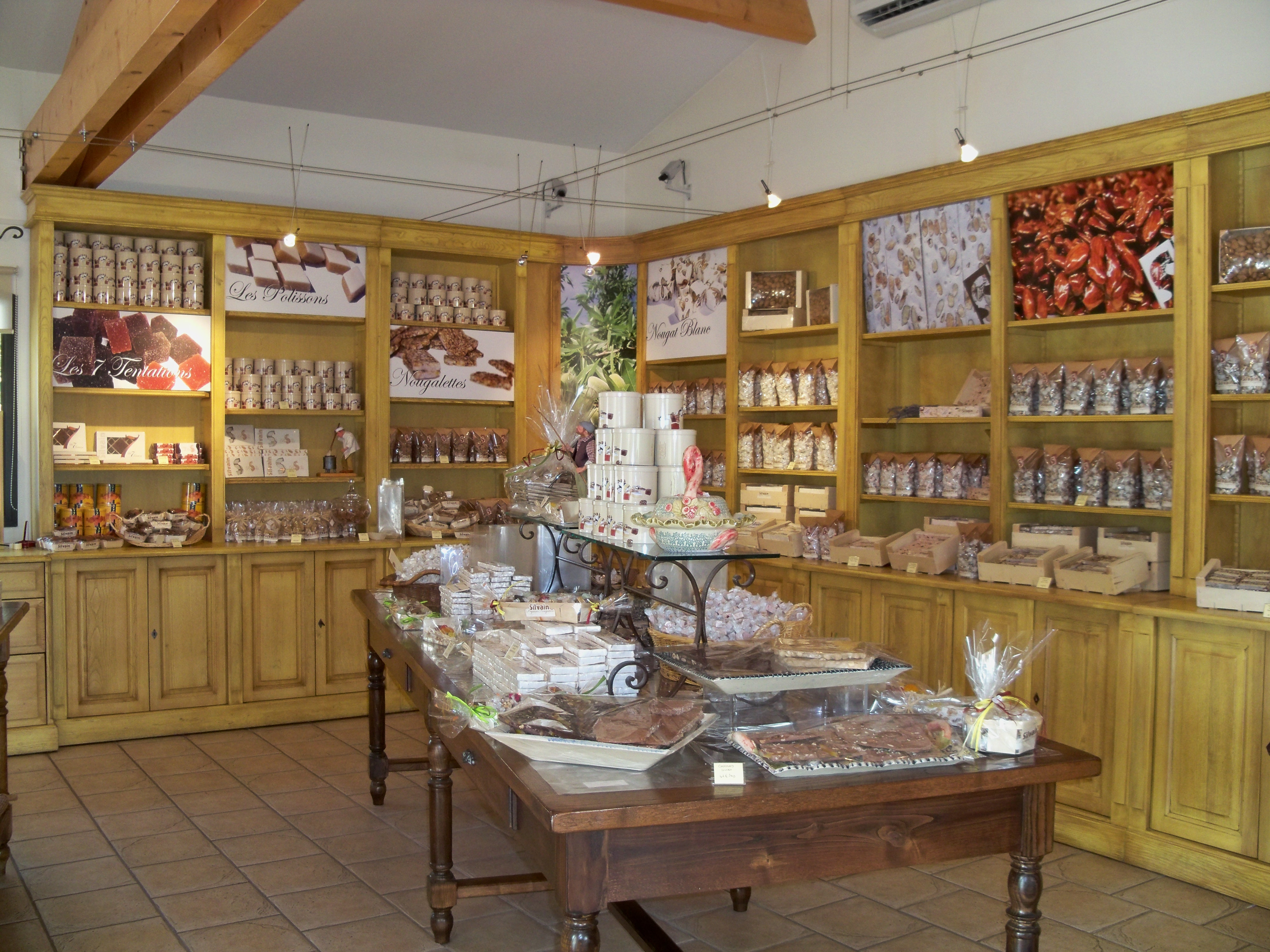 Magasin de nougatier à Saint Didier, Vaucluse, France